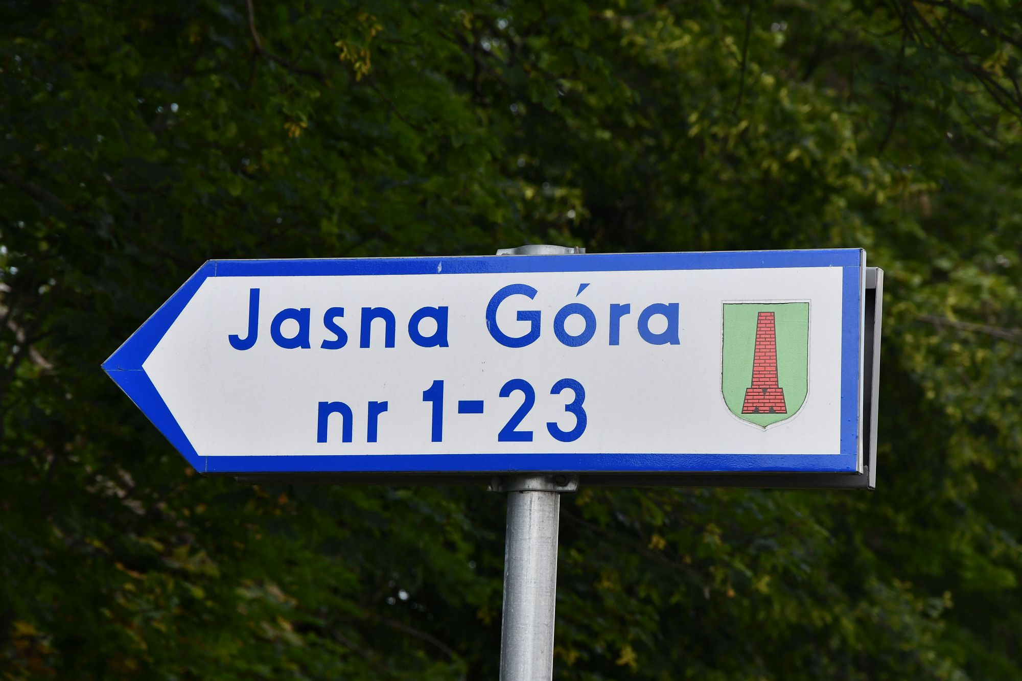 drogowskaz Jasna Góra k. Mokrska